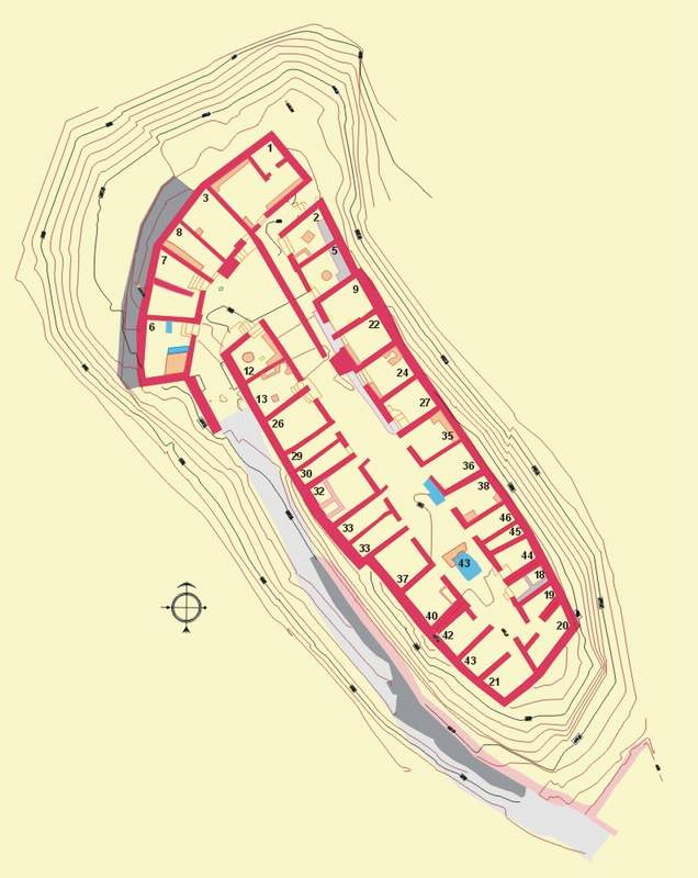 Plano del Castellet de Bernabé, con la fase final de la ocupación (hacia 200 a. C.)